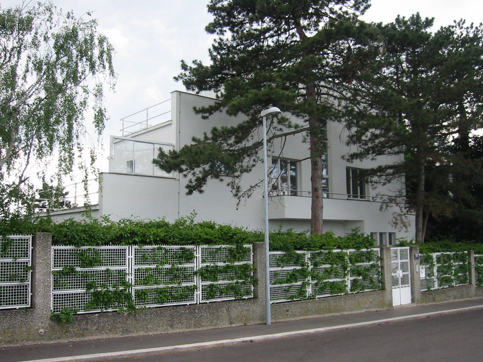 Haus Rezek samt Garage mit Dachterrasse und Treppe zur Peter-Jordan-Straße sowie Umfriedungen